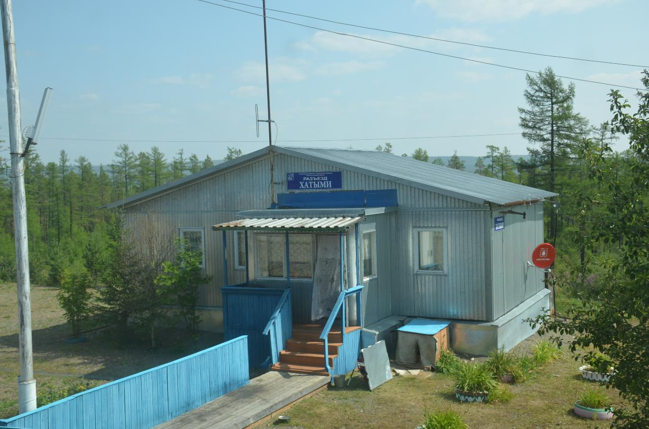 Поездка 5-6 августа 2019 г. по маршруту Якутск - Нерюнгри - Якутск во вновь назначенном поезде № 327 Нижний Бестях - Нерюнгри. Историческое событие - пуск пассажирского движения поездов из центральной Якутии, почти из Якутска.Железнодорожный разъезд Хатыми